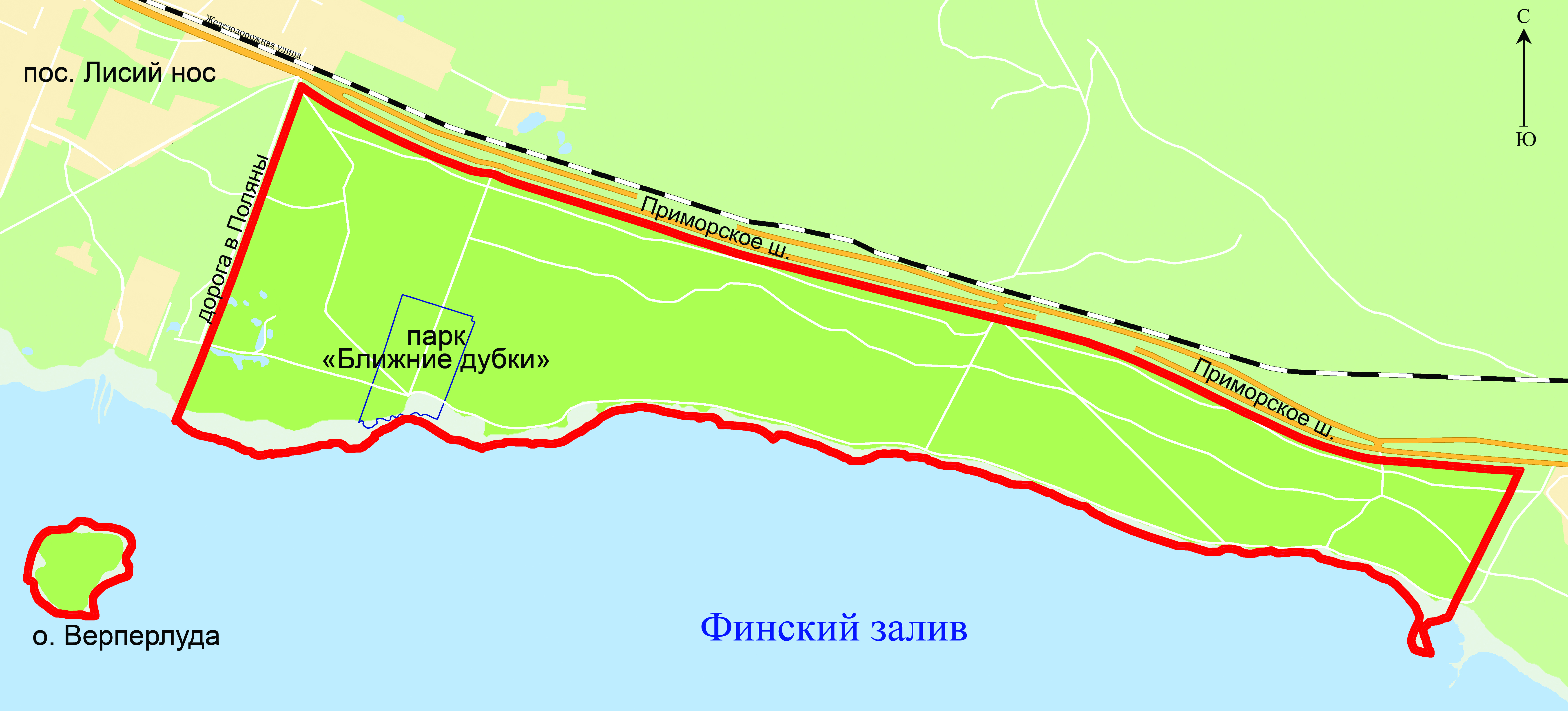 Заказник "Северное побережье Невской губы"